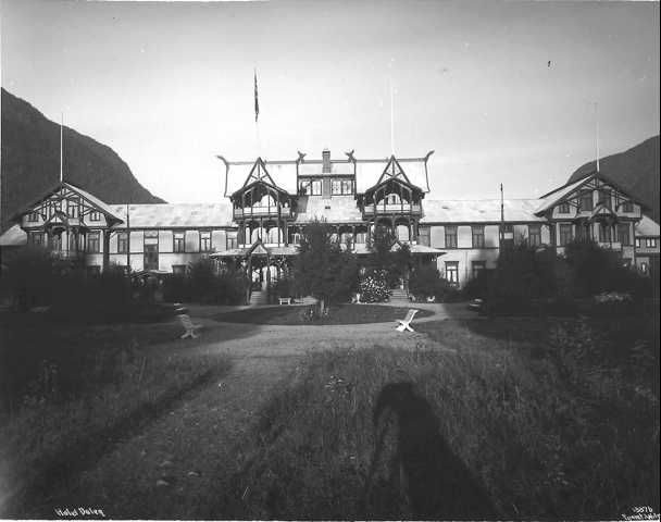 Dalen Hotel in Tokke, Norway